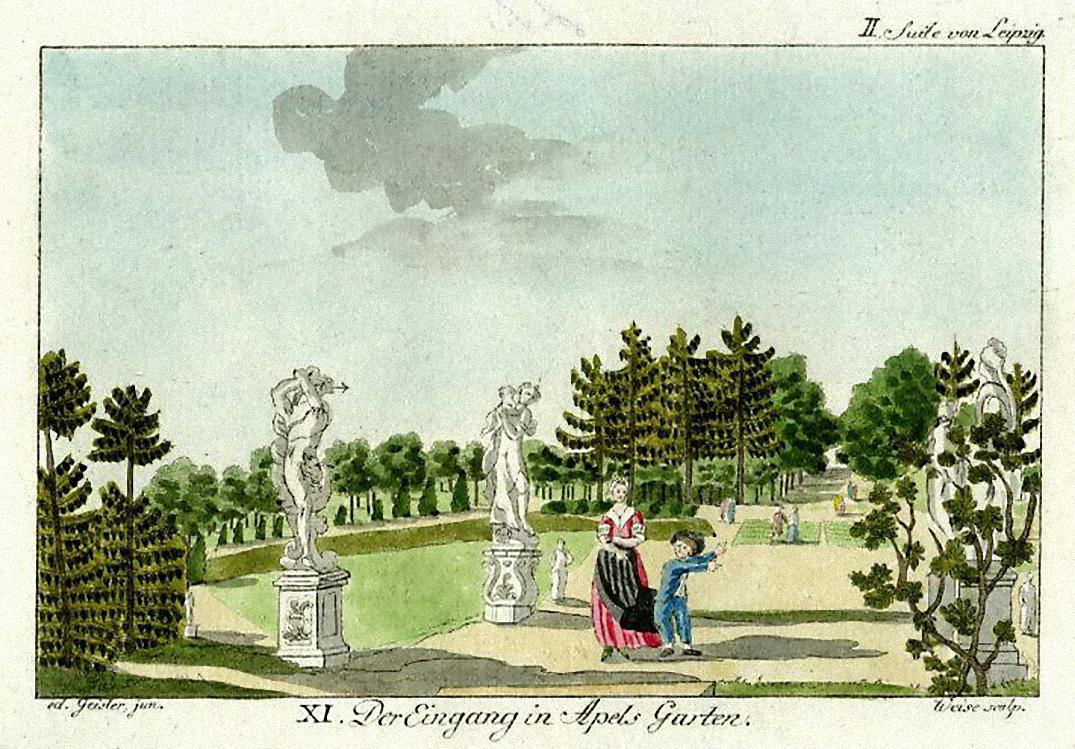 Eingang zu Apels Garten mit den Permoserfiguren